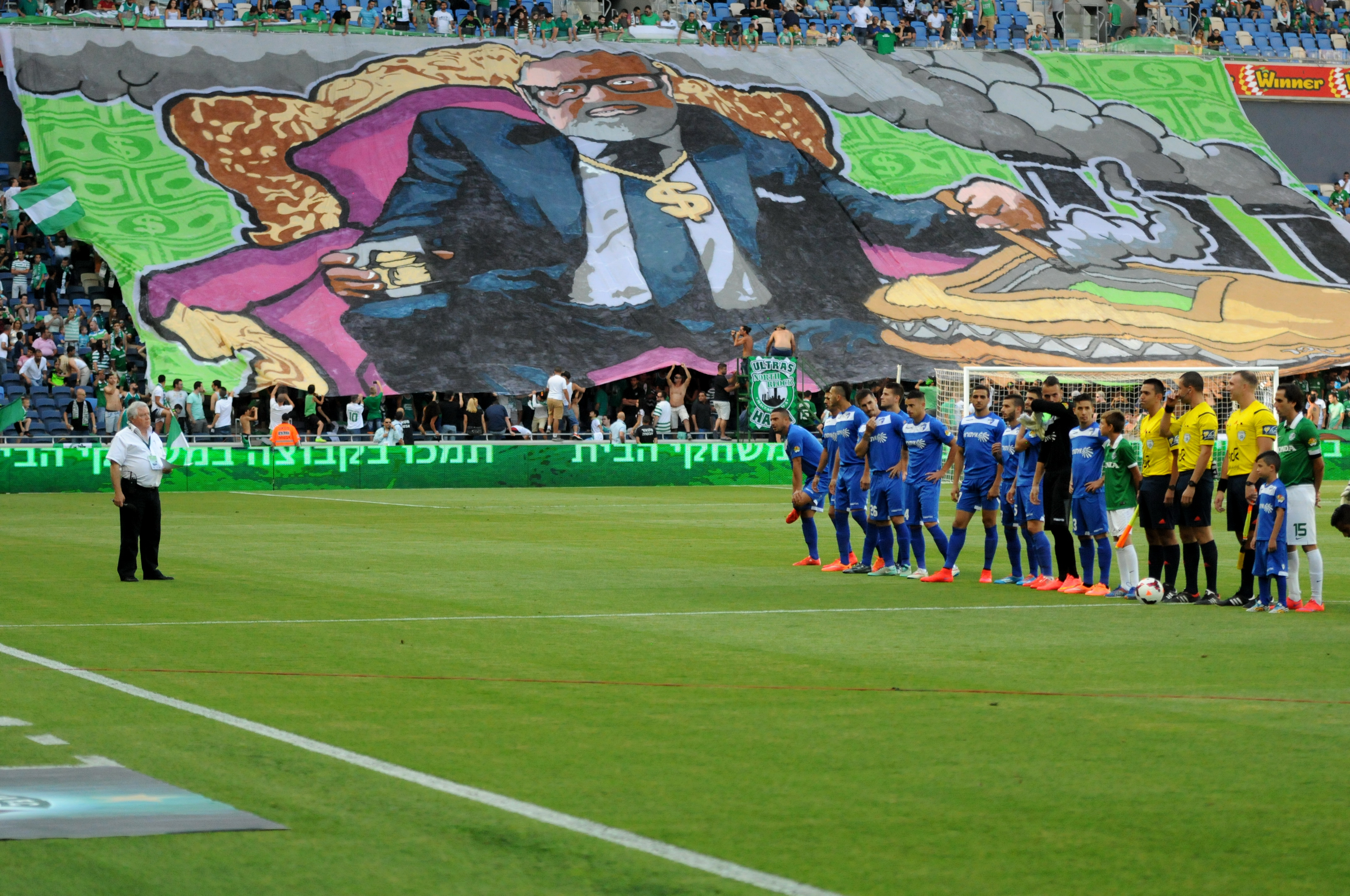 גרינפיס ישראל מפגינים נגד זיהום חיפה